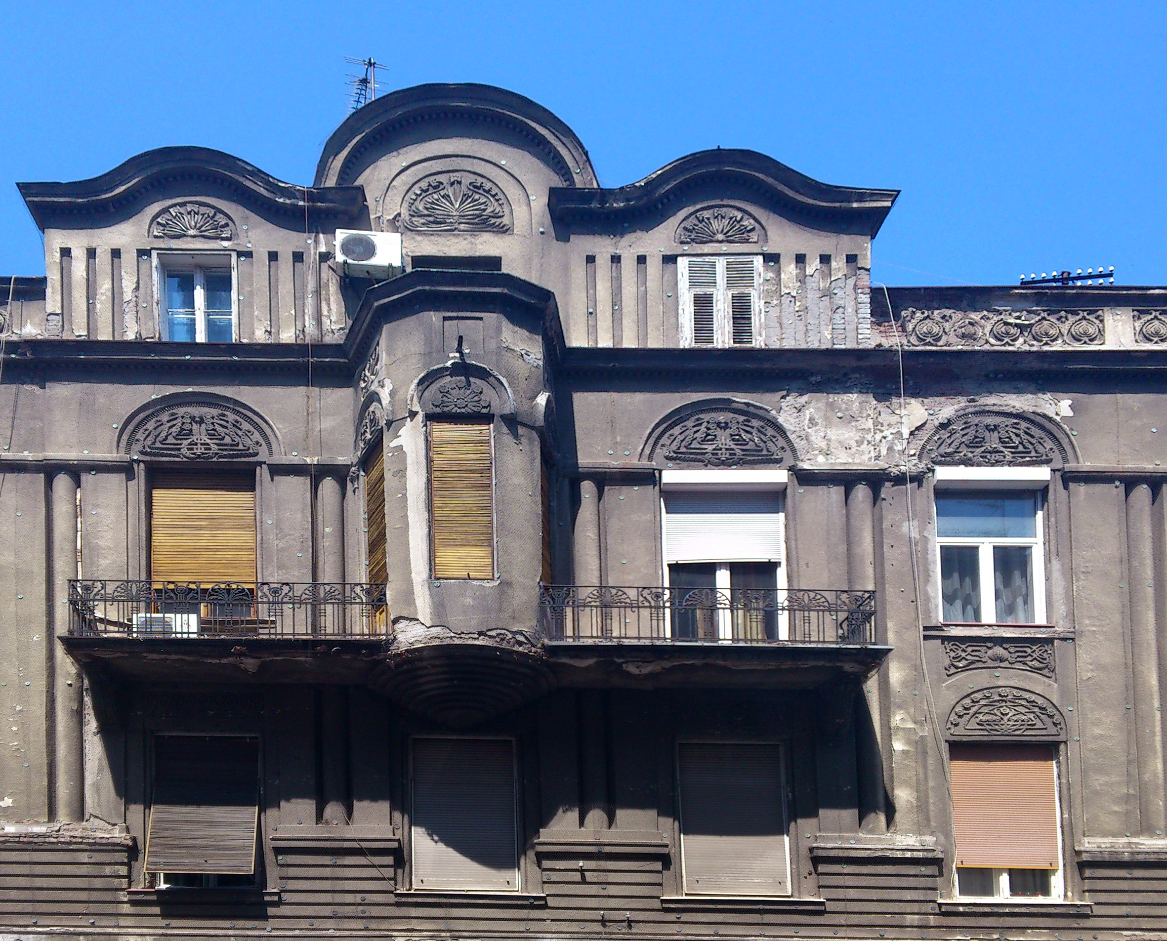 Beograd Kuća Mihaila Đurića Jevremova 13